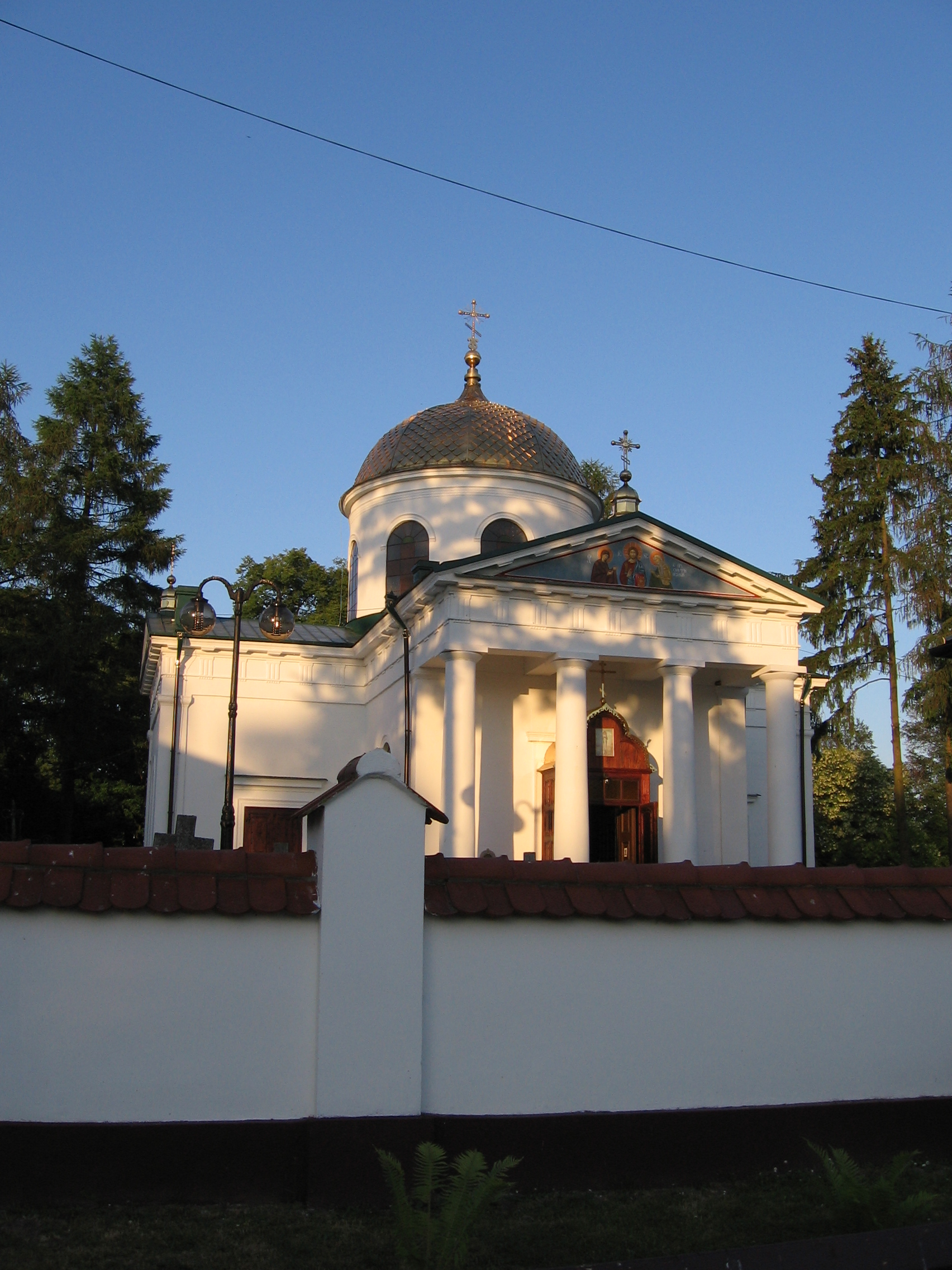 Zespół klasztoru prawosławnego (Jabłeczna) 03.1966.